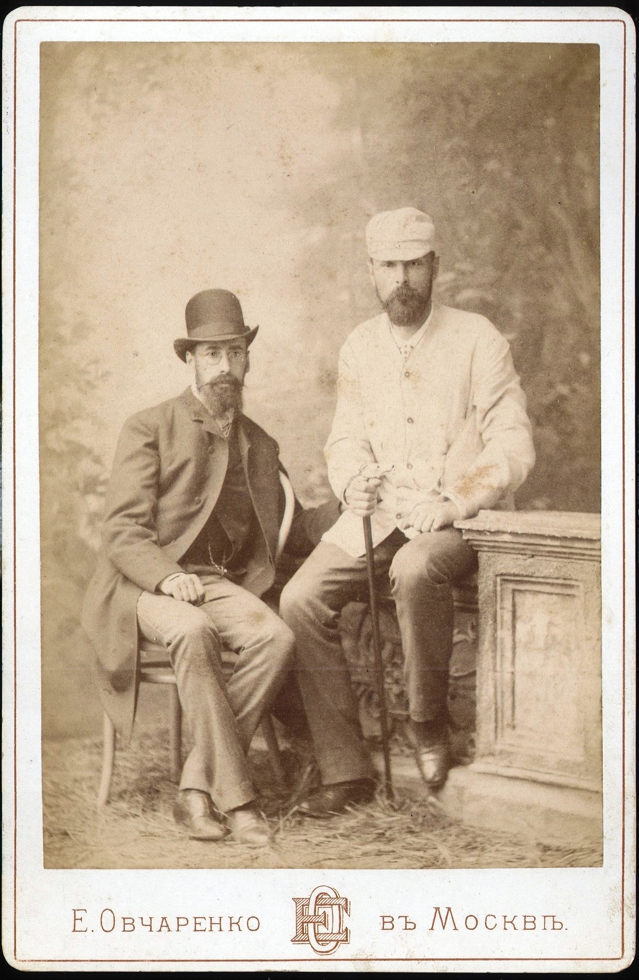 Одни из первых российских аквариумистов Золотницкий Н.Ф.и Мещерский А.С. 1891 г.